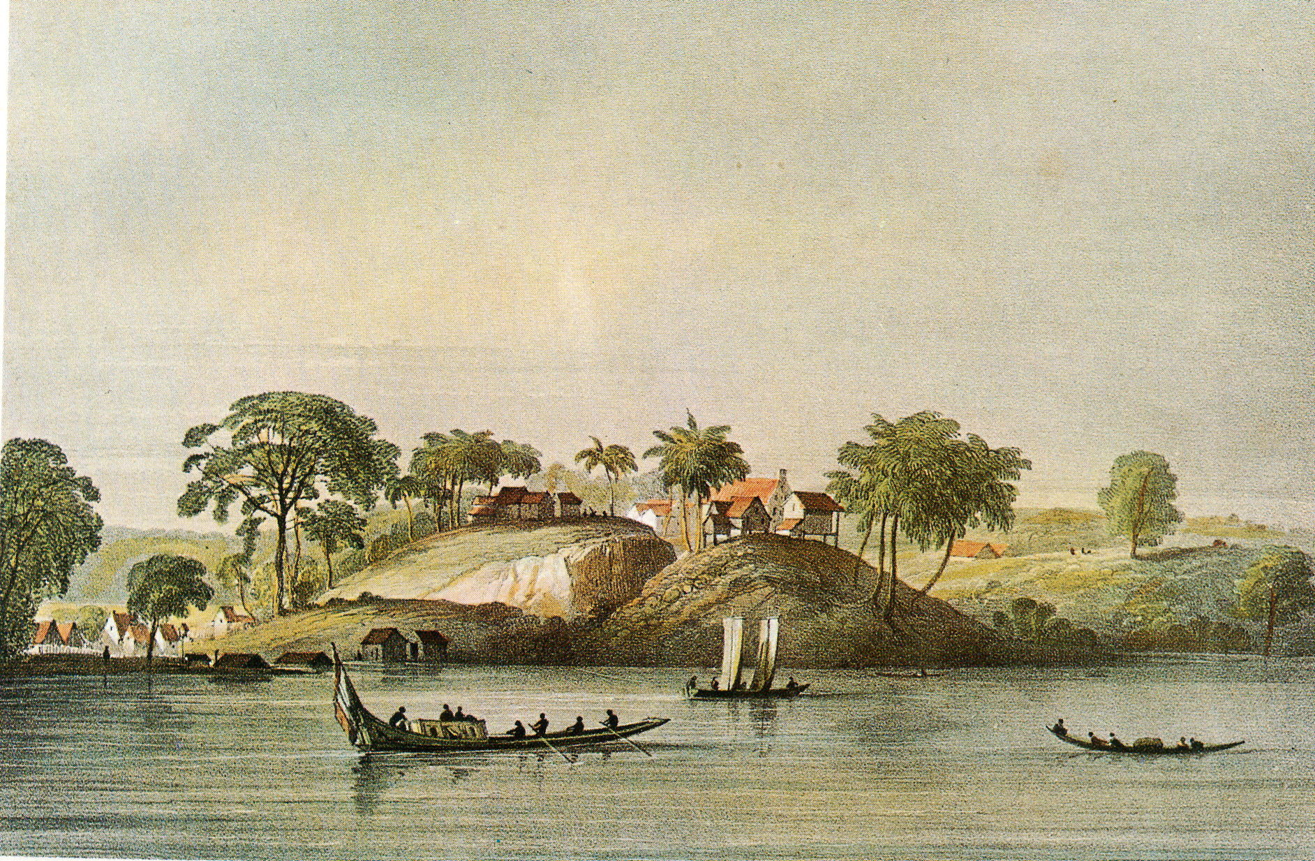 Jodensavanne